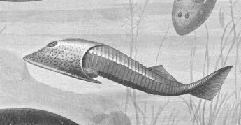 Osteostraci